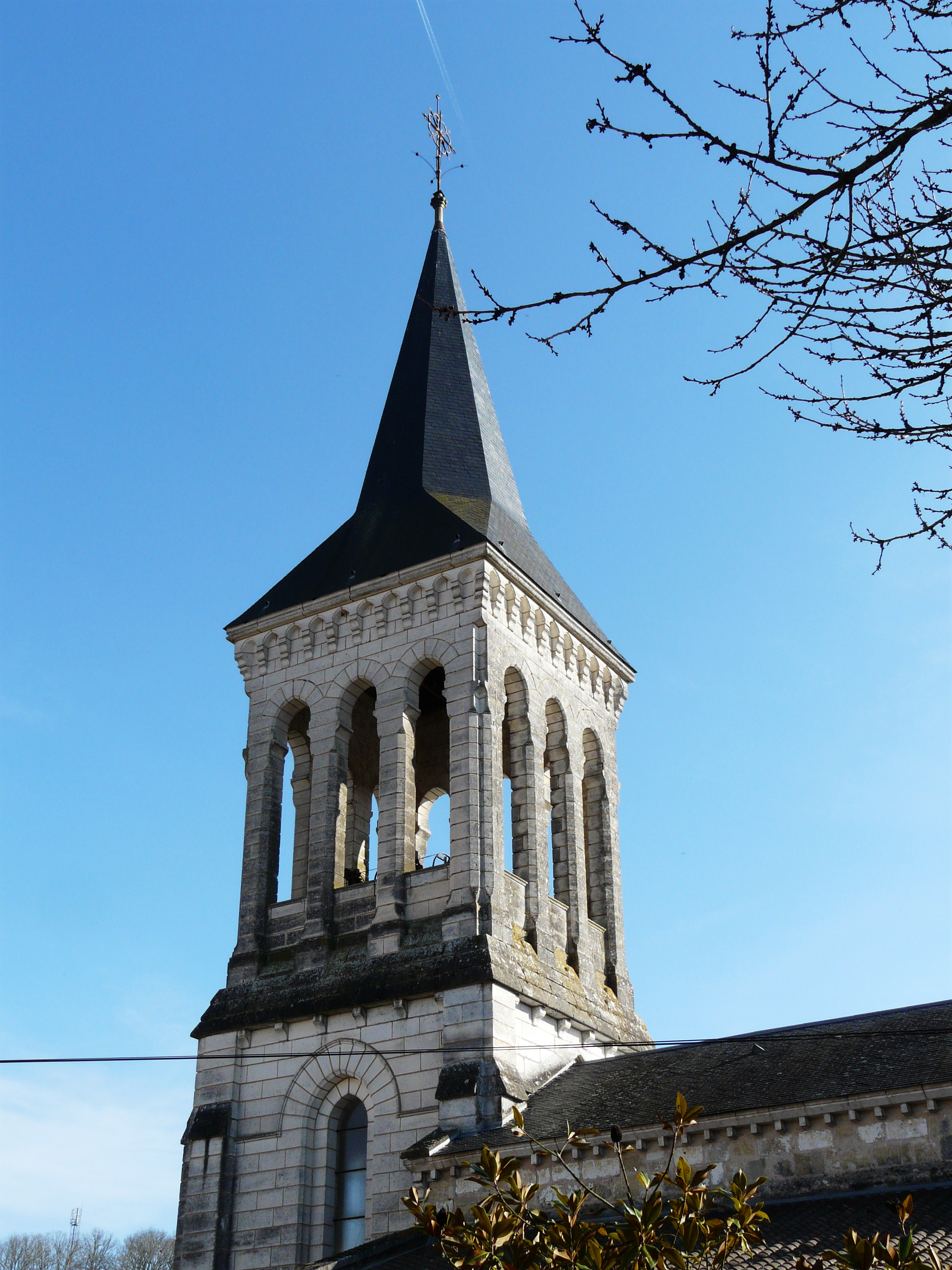 Le clocher de l'église Saint-Pierre-ès-liens vu du nord-ouest, Saint-Pierre-de-Chignac, dordogne, France.